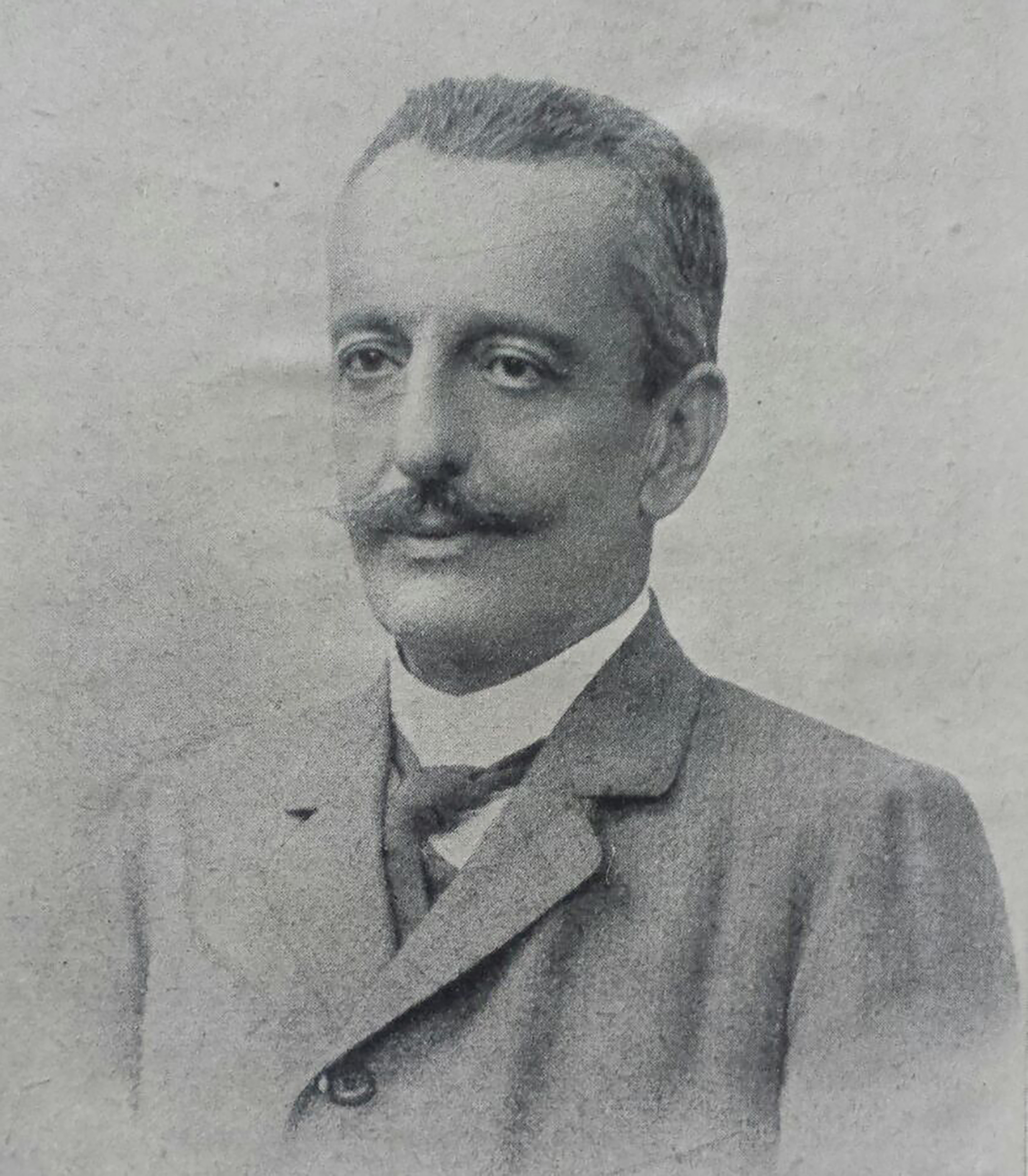 Foto di Giovanni Cuppari